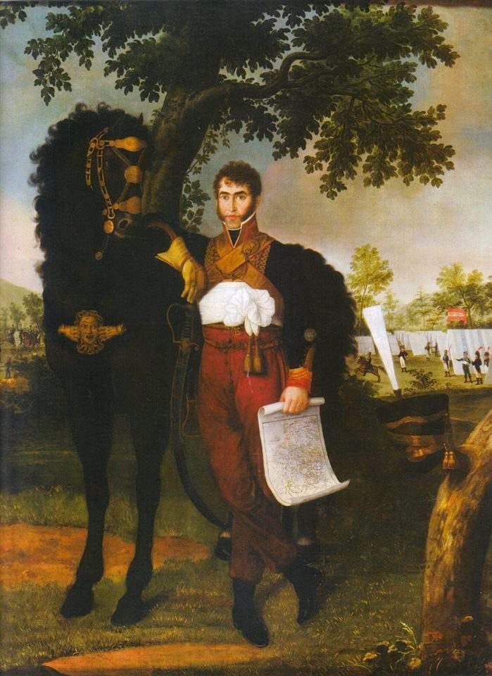 Coronel Carlos de Montúfar y Larrea, Comisionado Regio de Quito, hijo del marqués Juan Pío Montúfar. Patriota revolucionario de la independencia de Ecuador. Óleo sobre lienzo, autor desconocido (siglo XIX)